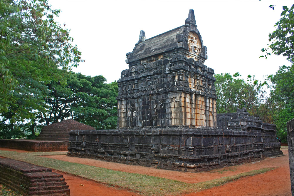 நாலந்த சிலை மண்டபம்